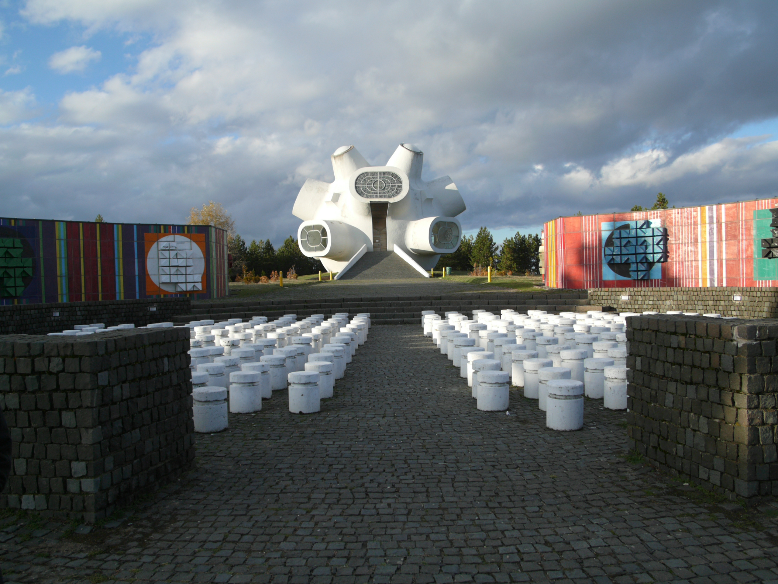 spominski center Makedonium Kruševo